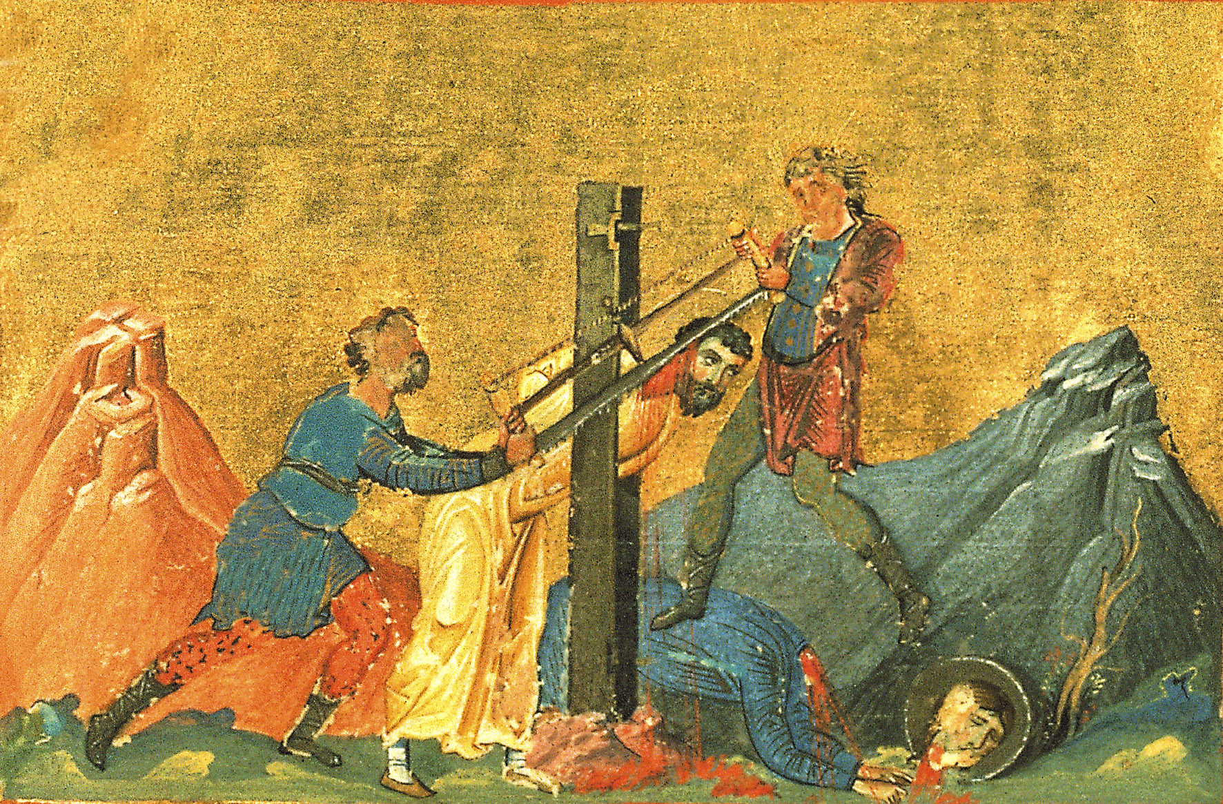 Мученики Сарвил и Вевея Эдесские Константинополь. 985 г. Миниатюра Минология Василия II. Ватиканская библиотека. Рим.